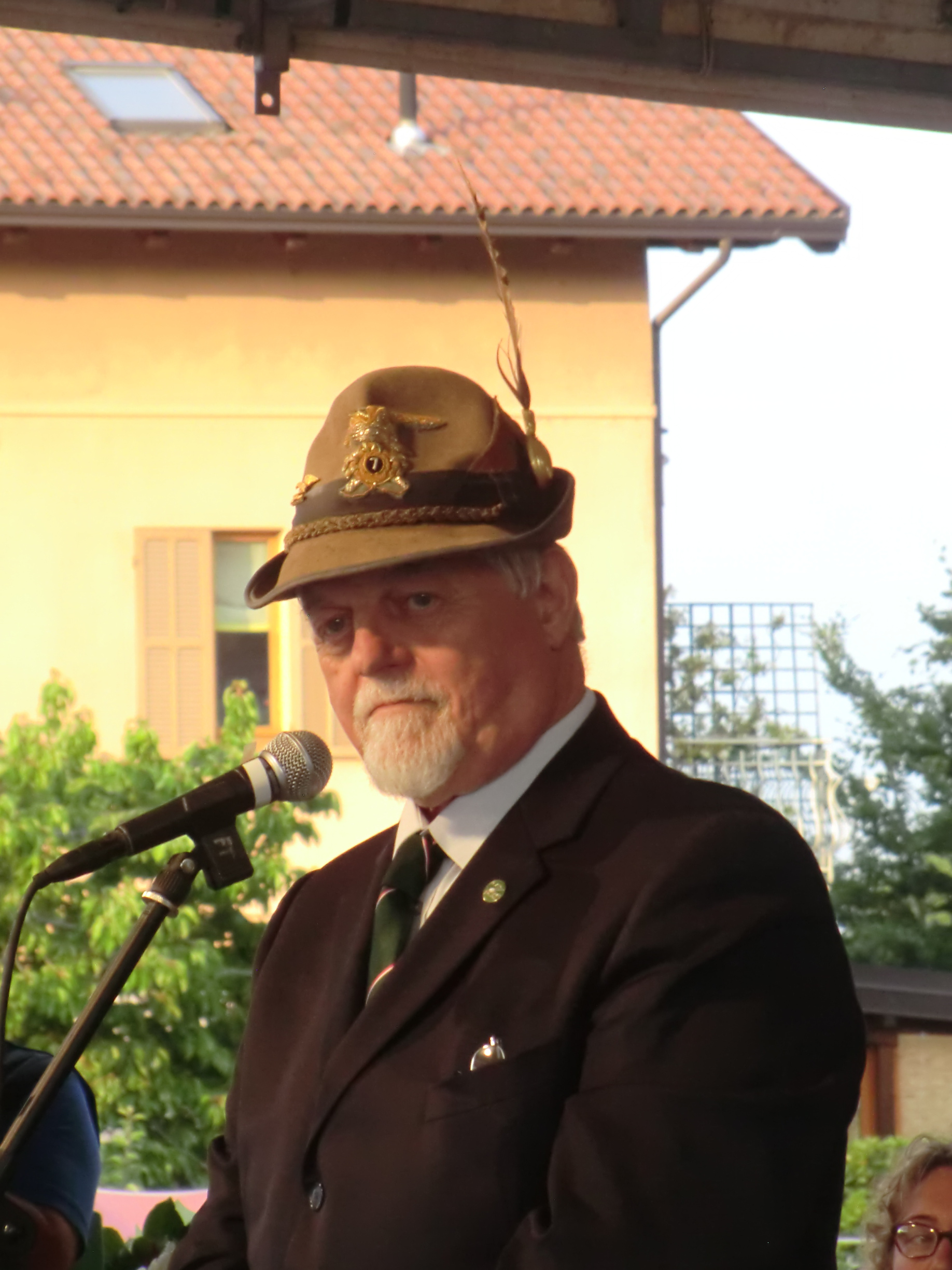 Sebastiano Favero nel 2014 alle alpiniadi estive del 2014 in qualità di presidente Associazione Nazionale Alpini